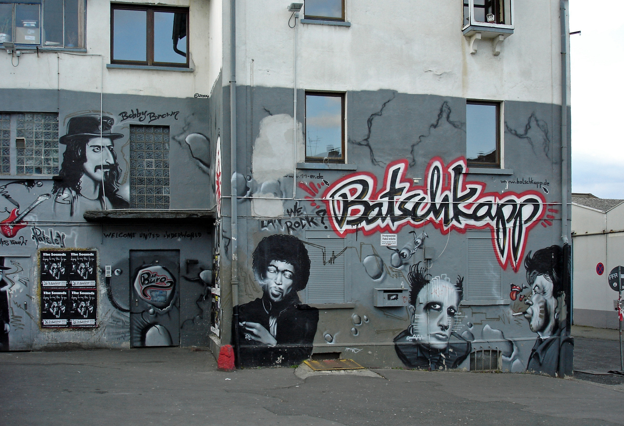 "Batschkapp" in Frankfurt am Main, Graffiti by BOMBER/Helge W. Steinmann VG Bildkunst